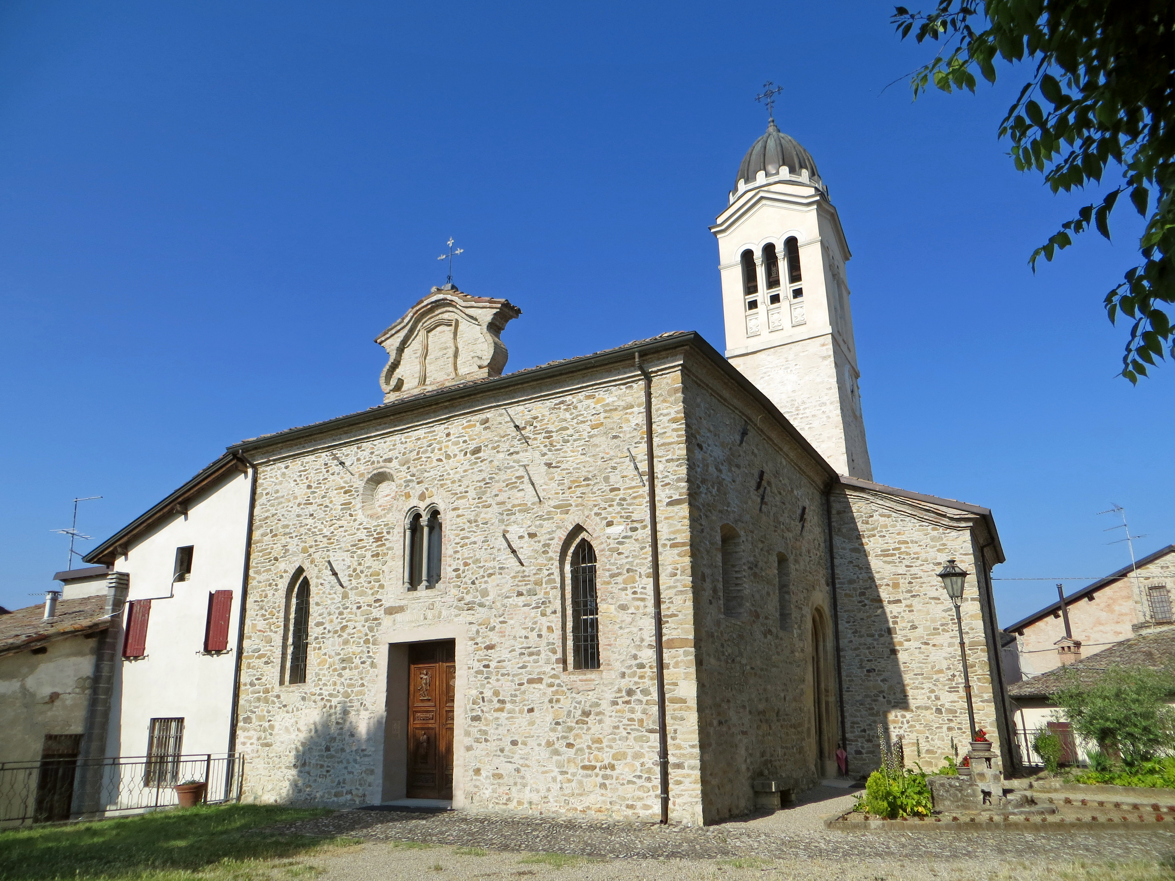 Chiesa di San Michele Arcangelo (Lesignano de' Bagni) - facciata e lato sud